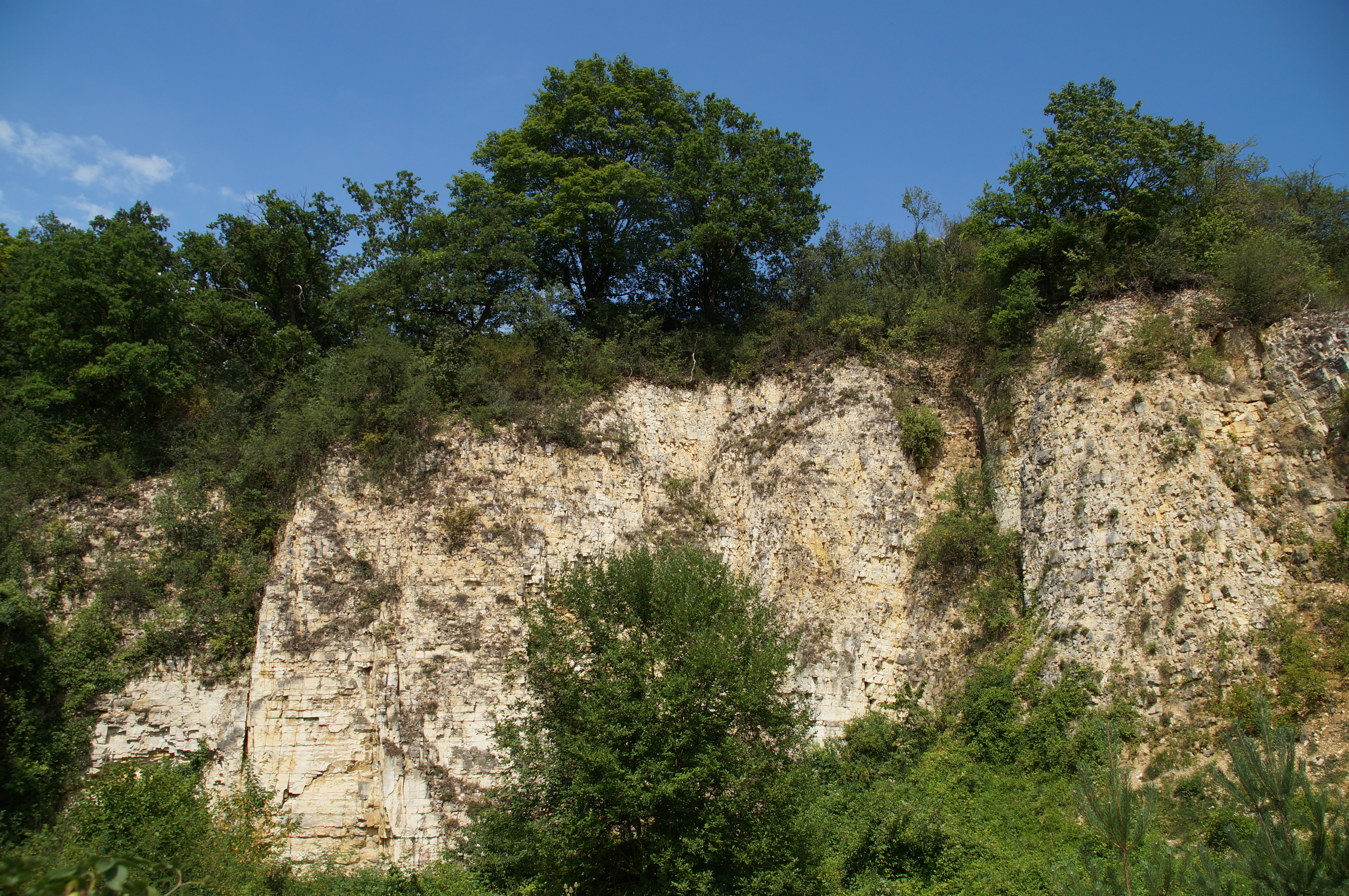 Ehemaliger Steinbruch bei Kager, Regensburg, Geotop-Nr.: 362A001